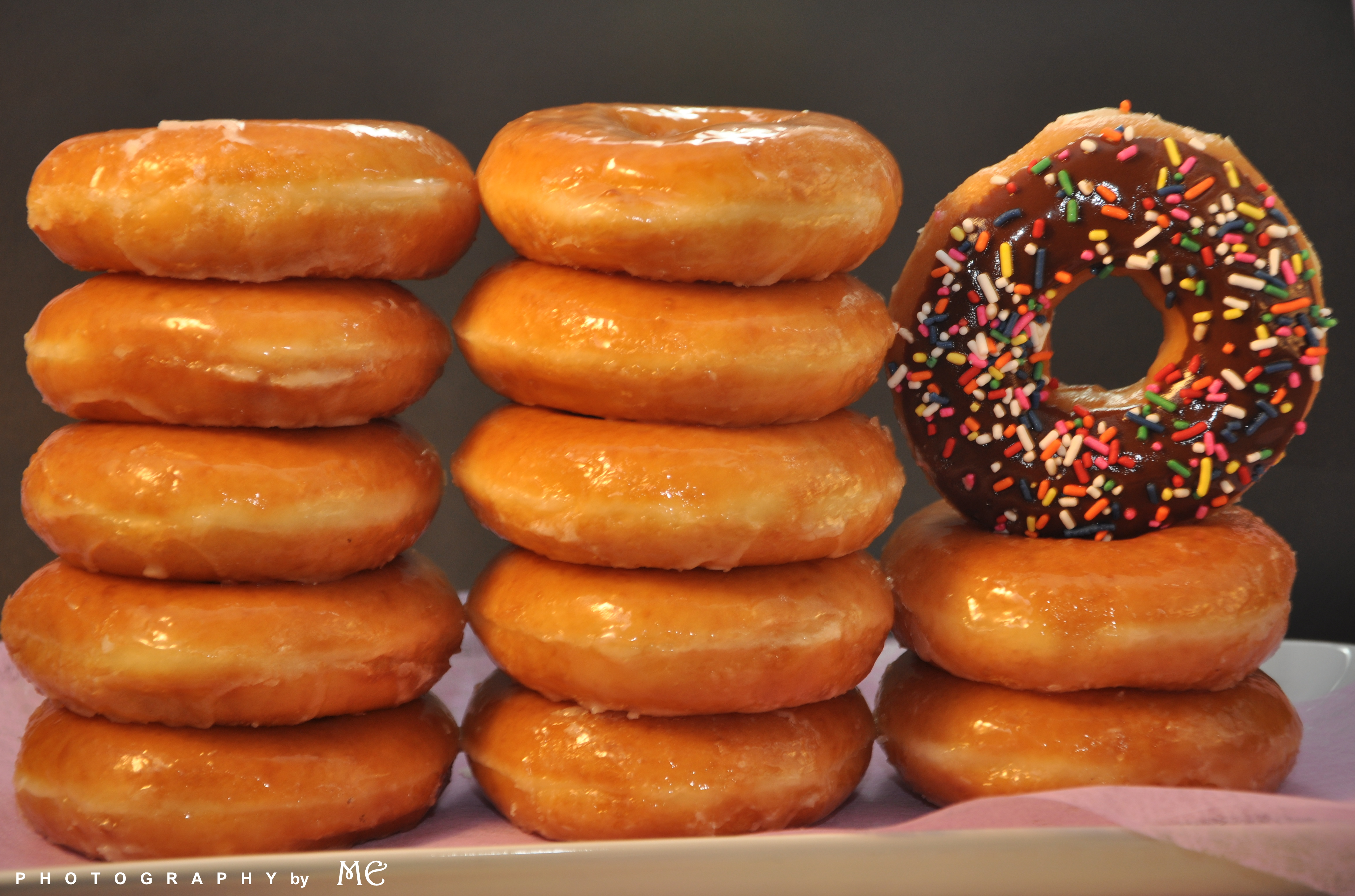 krispy kreme donuts